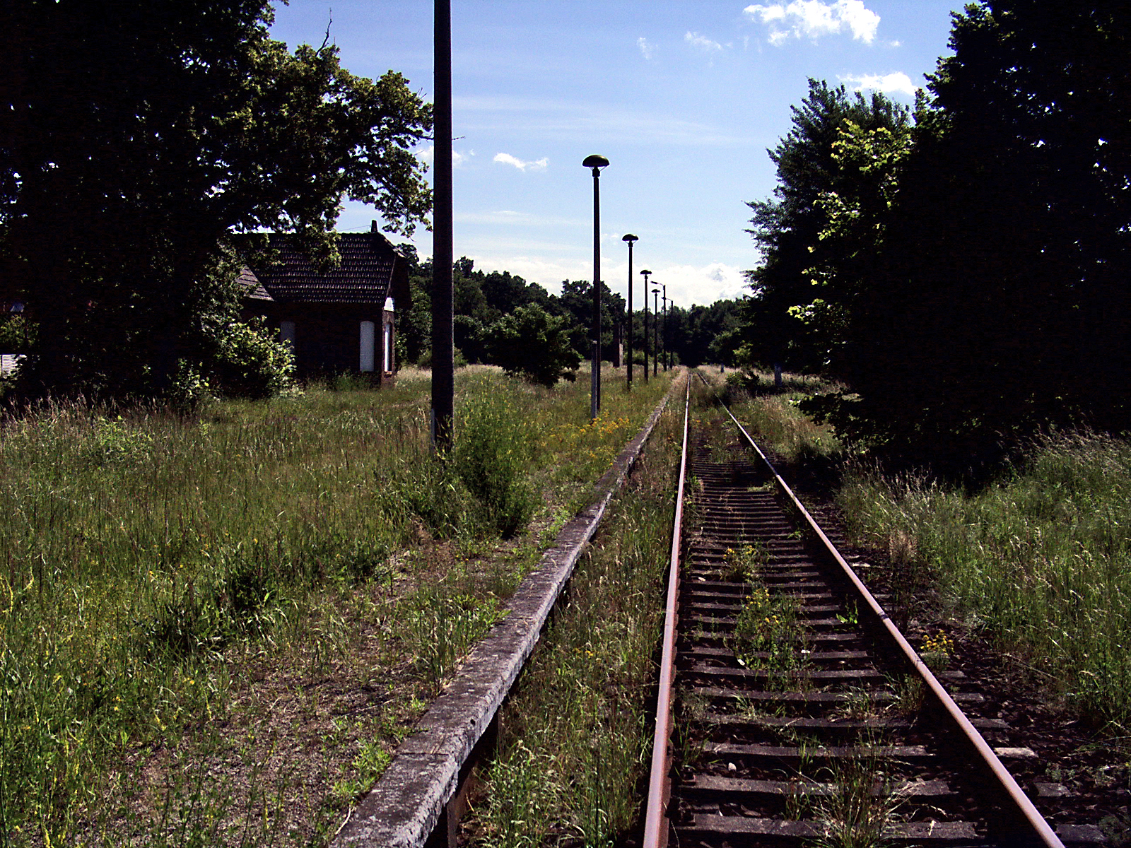 ehemaliger Bahnhof Leuenberg an der Wriezener Bahn